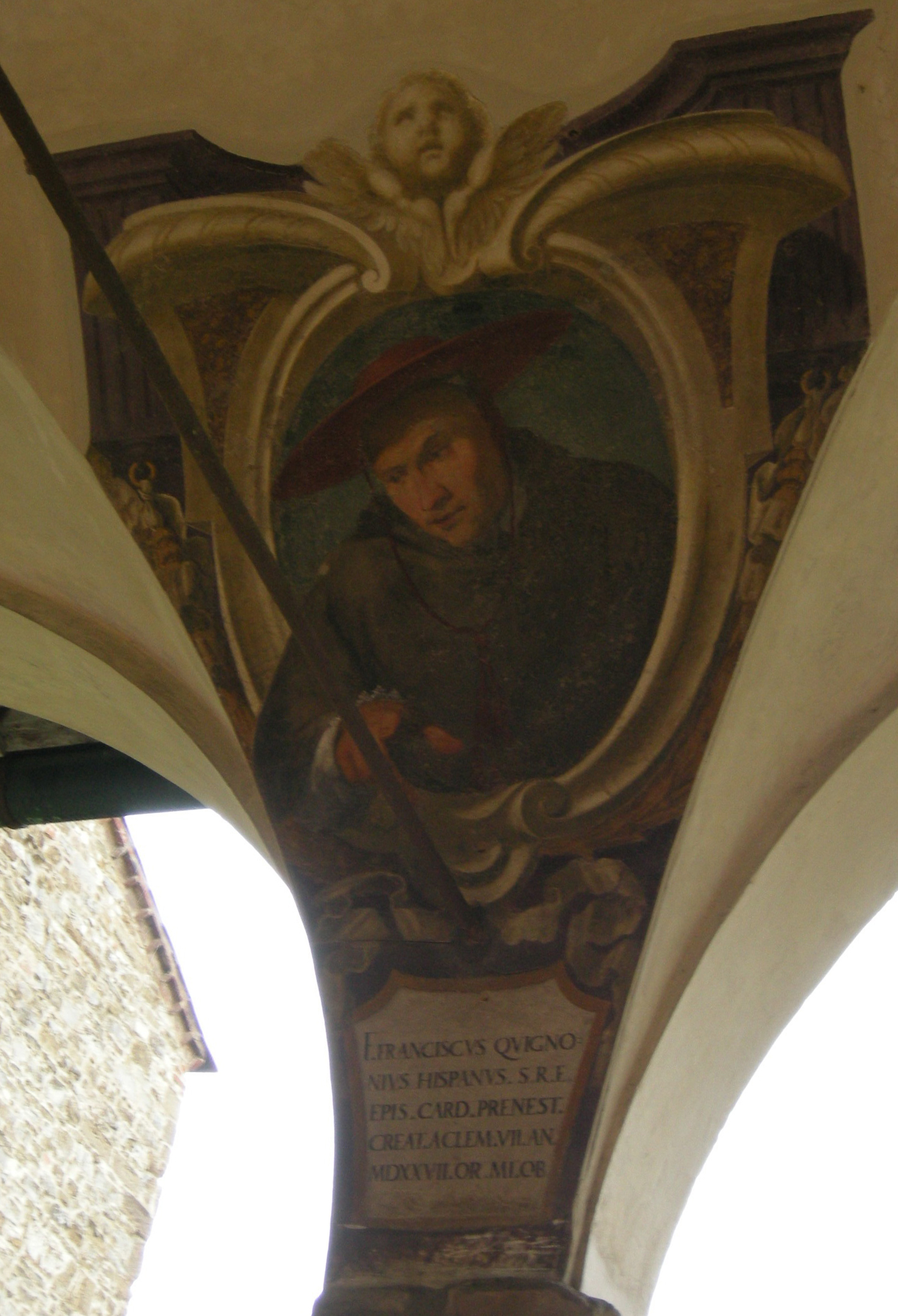 Chiostro di ognissanti, personalità francescane 45 Francisco de los Angeles Quiñones